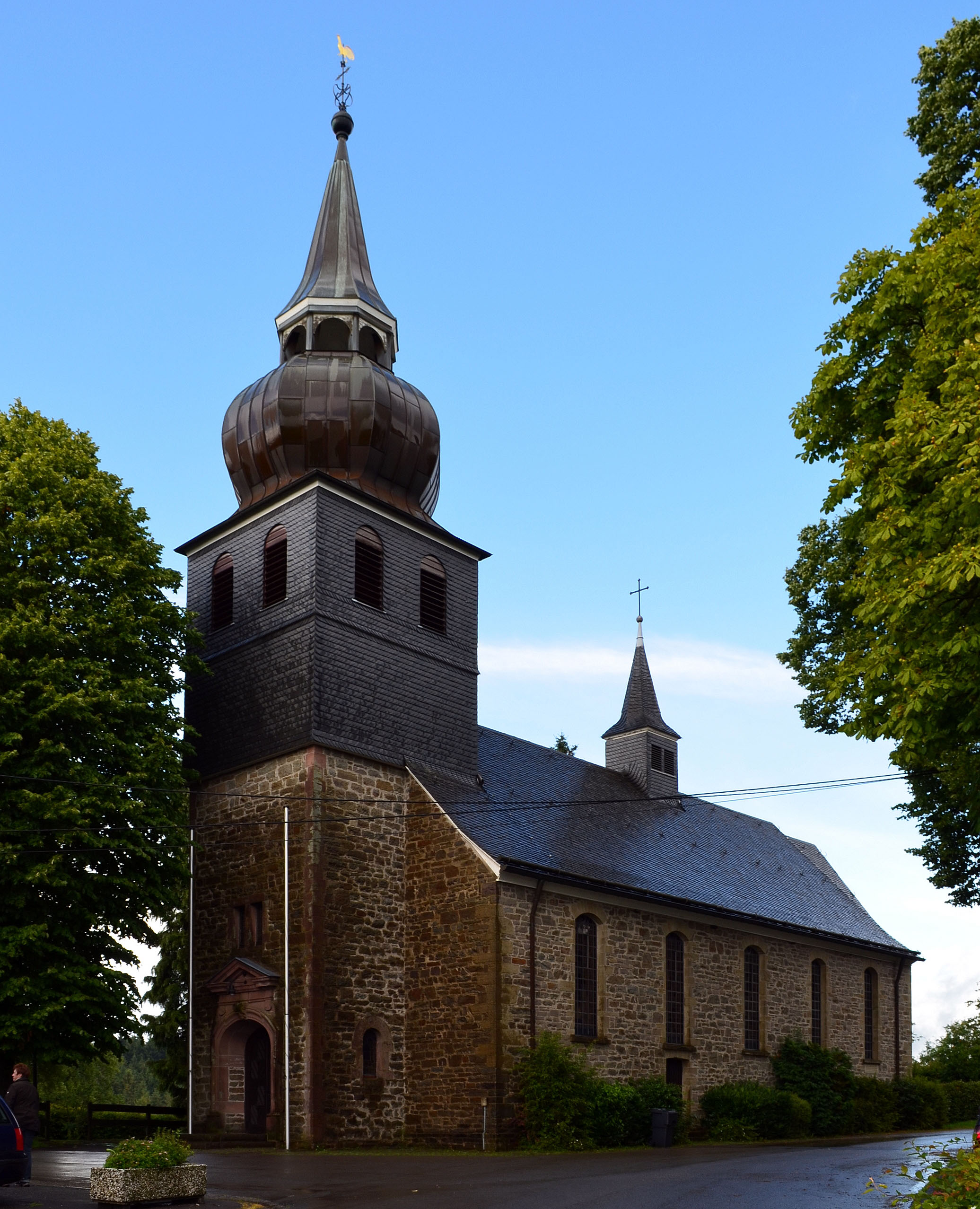 Egen, Kirche, Unbefleckte Empfängnis, Außenansicht 1